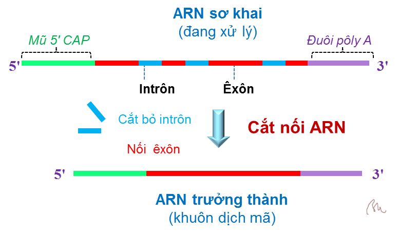 Cắt nối ARN là giai đoạn xử lý mARN, ở đó phân tử ARN sơ khai bị loại bỏ đoạn không mã (intrôn), nối và giữ lại đoạn có mã (êxôn).